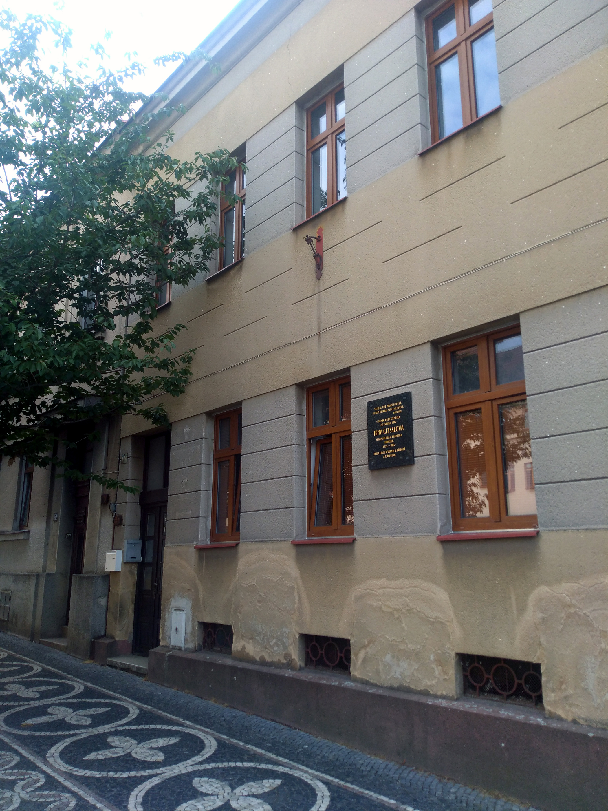 Jičínský dům, ve kterém žila Irma Geisslová.